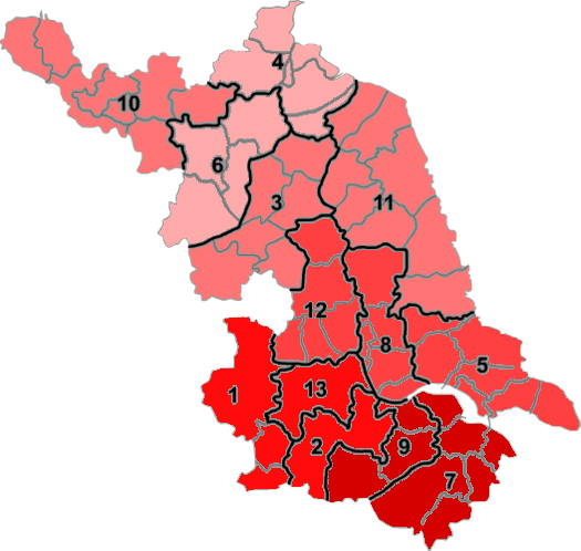 2015年，江蘇各地級行政区人均國內生产总值分佈圖。